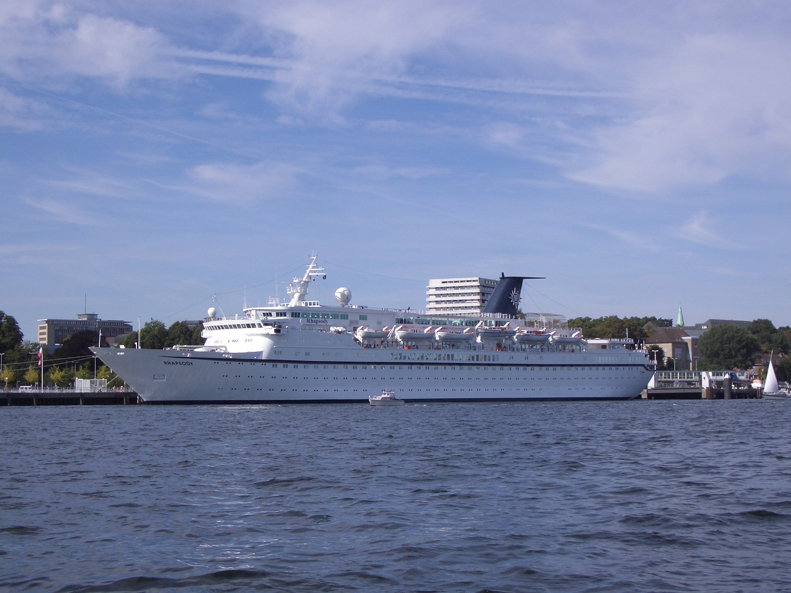 Kreuzfahrtschiff Rhapsody im Kieler Hafen.